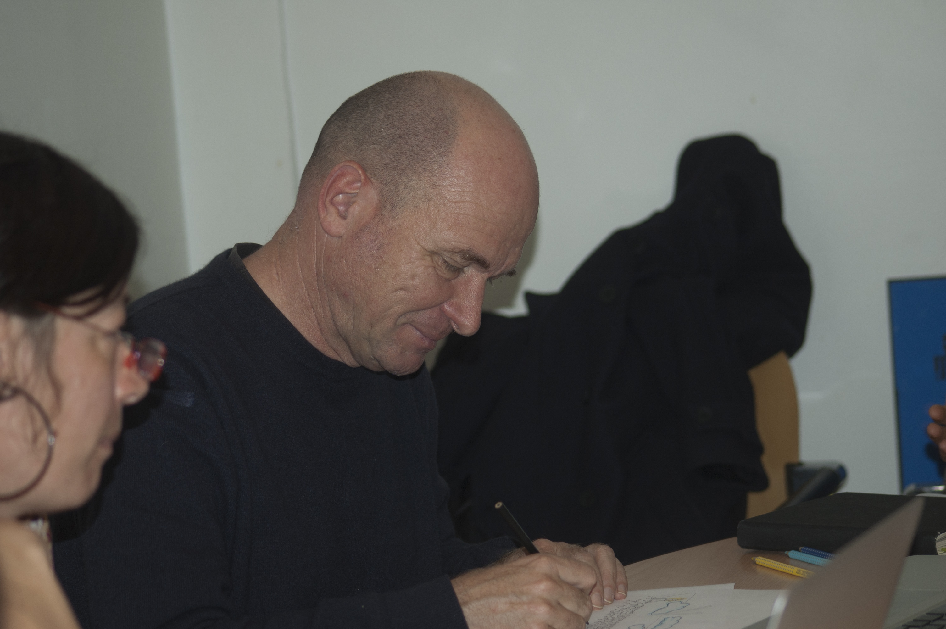 Carlus Padrissa trabajando en una ópera junto a su alter ego, Mireia Romero